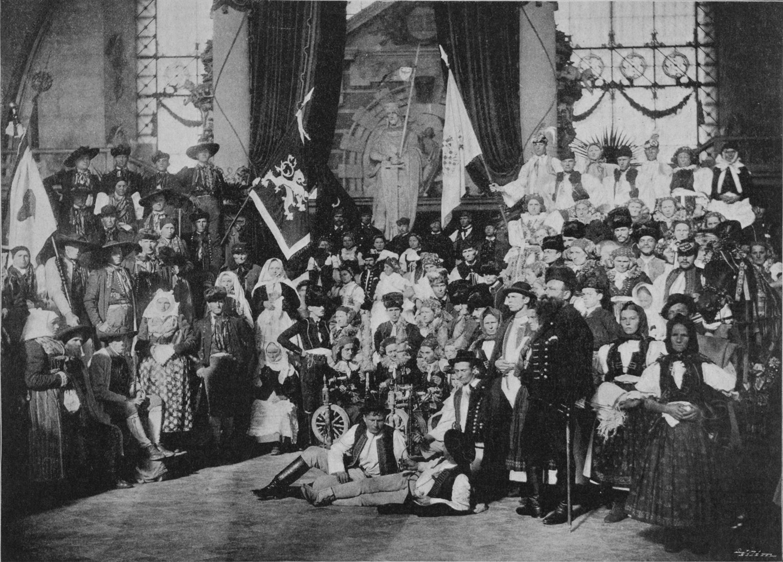 Původní popisek v časopise Světozor: "Živý obraz ku poctě arcivévody Ludvíka o jeho návštěvě na N. V. Č. 19. října 1895." Uprostřed se nachází skupina přástek z Nákla, vpravo skupina valašská, vlevo skupina chodská, v pozadí uprostřed a vlevo moravští a uherští Slováci. Zcela vzadu socha svatého Václava od sochaře Stanislava Suchardy. Autorem kompozice živého obrazu byl malíř Karel Štapfer. Více viz článek ve Světozoru.